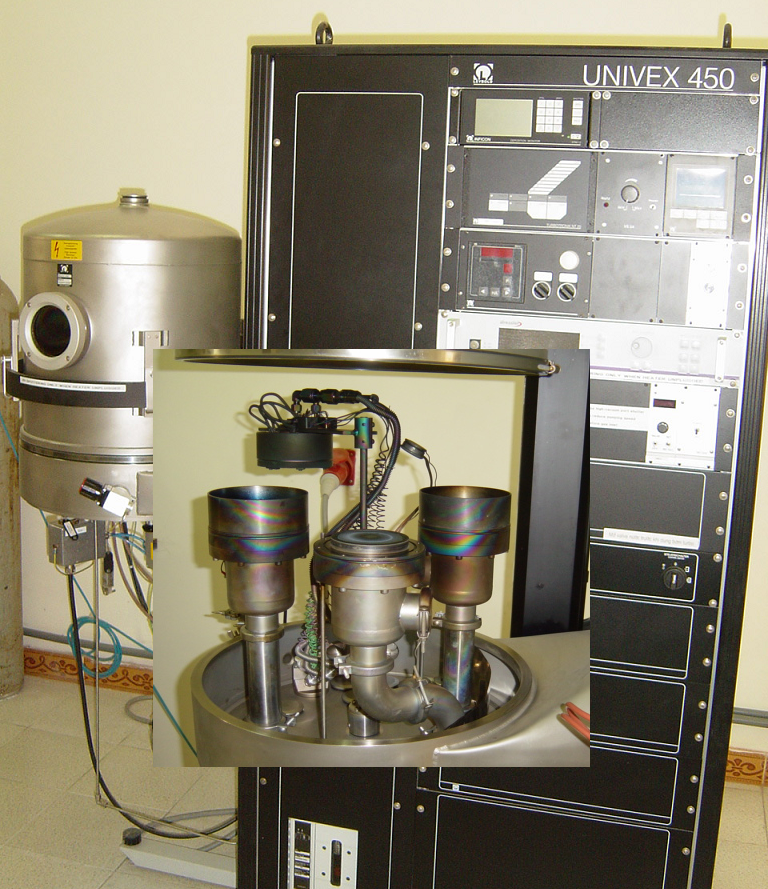 Hình do Deshi tạo ra (Ảnh chụp hệ sputtering Univex 450 tại Đại học Quốc gia Hà Nội)